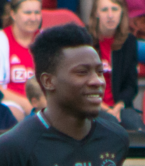 Ajax Open Training